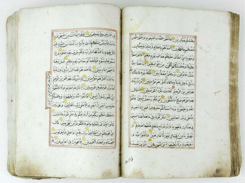 Koran. Handgeschreven Koran met rijk versierde folio's Acèh: Kuru'an seunurat